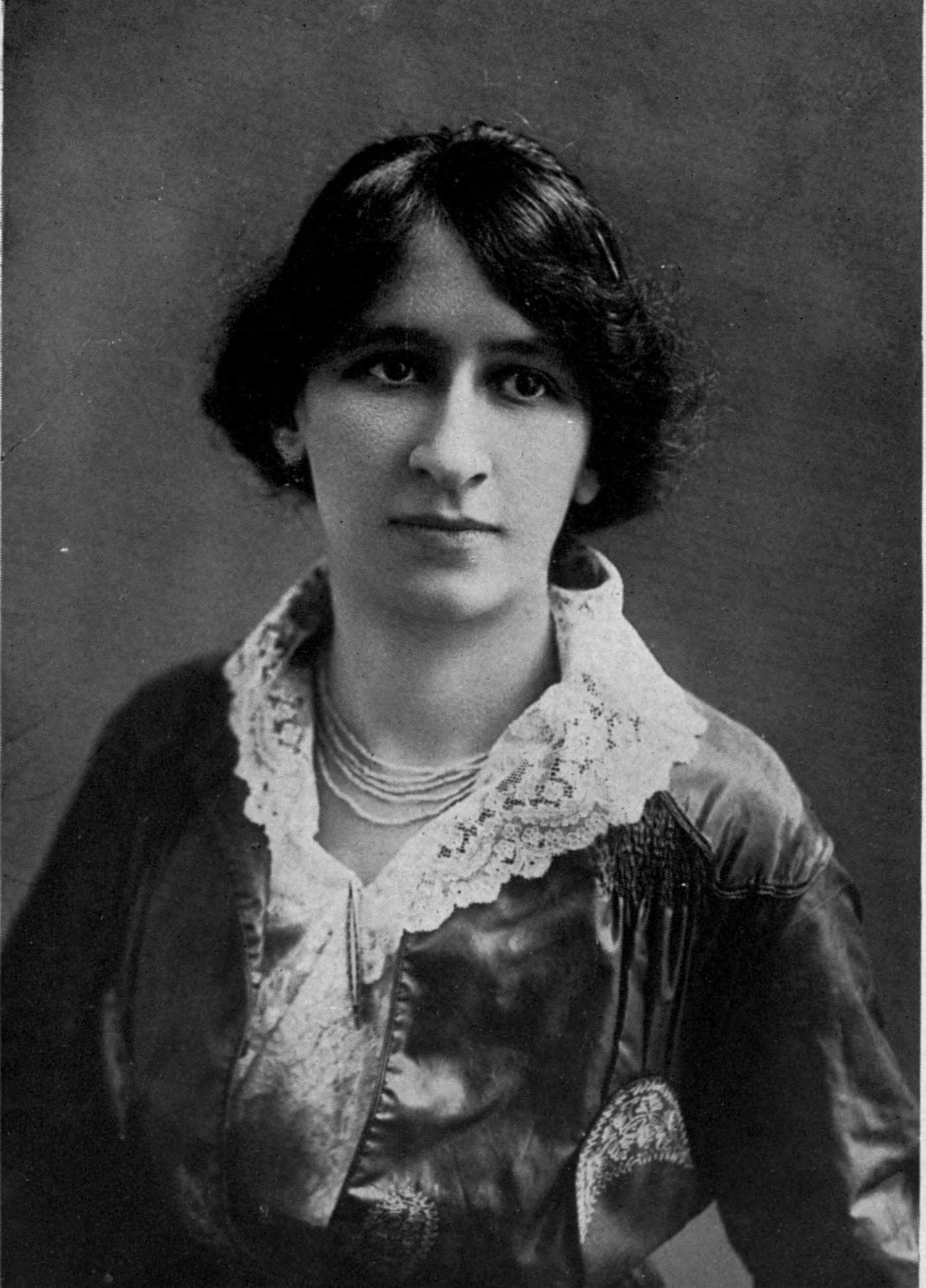 Sarah Alexandrine Louise "Louli" Sanua of the Ancien Prieure (L'École de Haut enseignement commercial pour les jeunes filles) in Paris